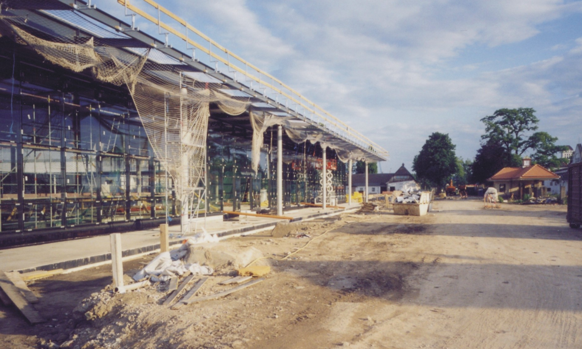 Messe Dresden, Bau des neuen Eingansbereiches (1999)